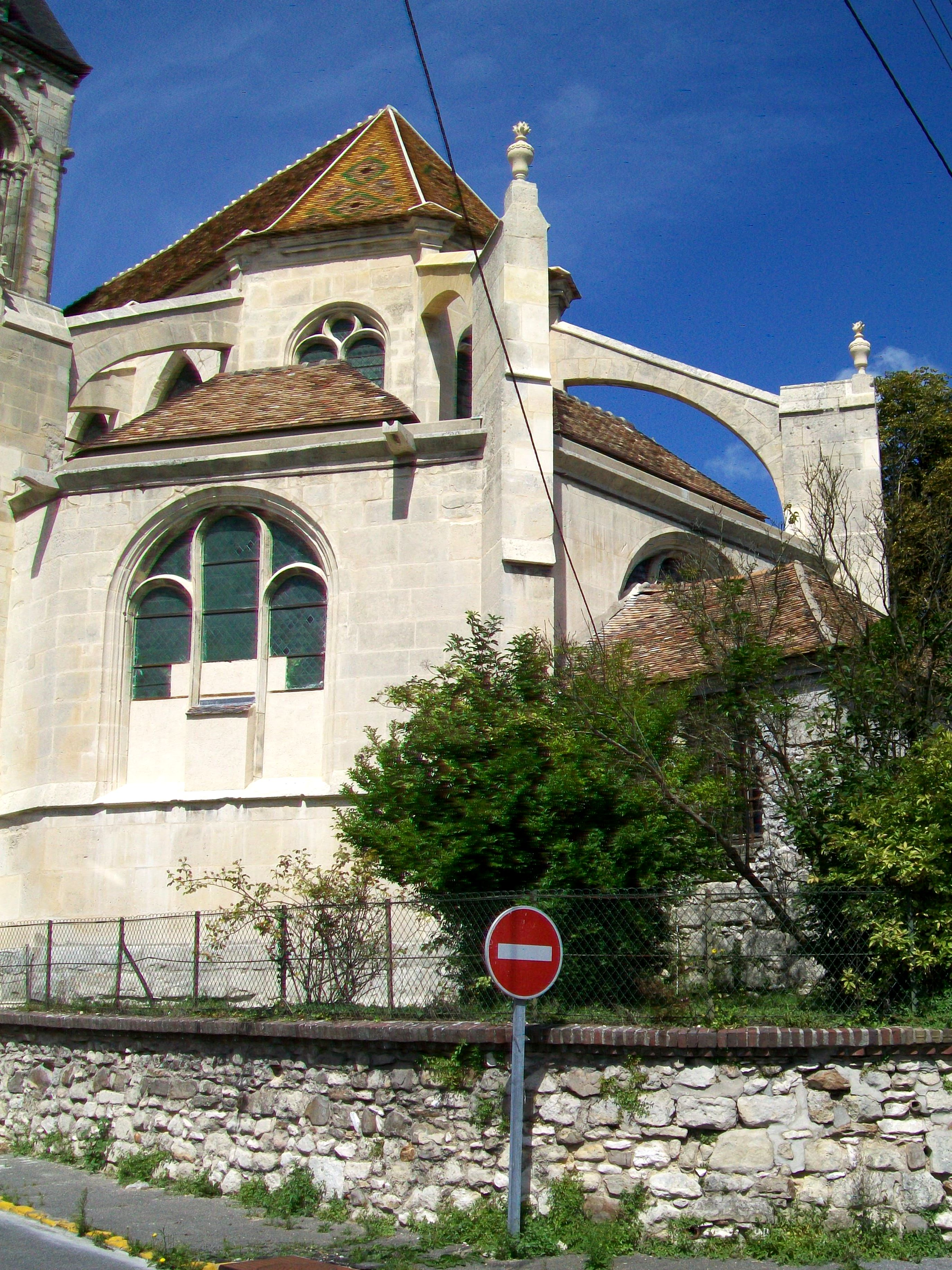 Le chœur gothique de l'église Saint-Aquilin, remarquable pour ses arc-boutants. Il comporte quatre travées et est aussi long que la nef.